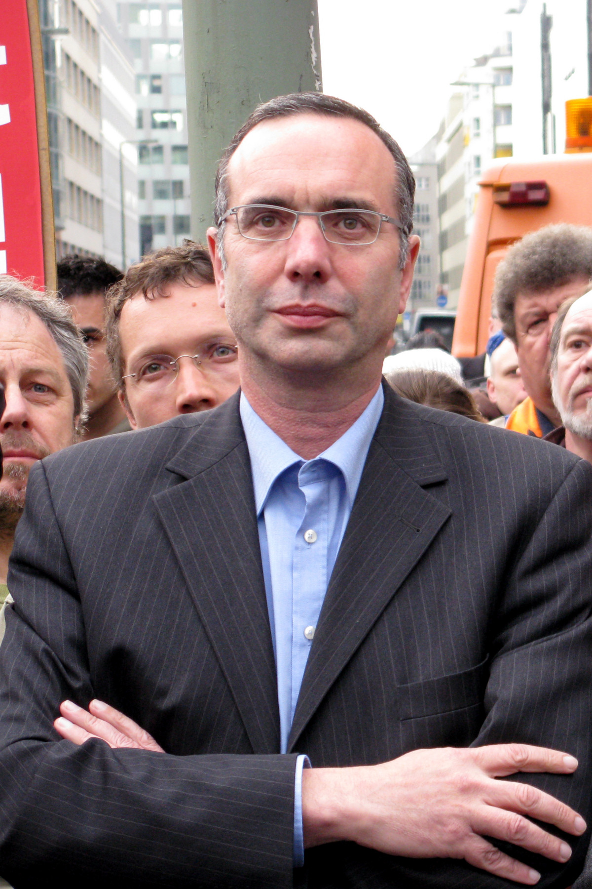 Harald Wolf, Senator für Wirtschaft, Technologie und Frauen von Berlin, bei der Umbenennung der Kochstraße in Rudi-Dutschke-Straße